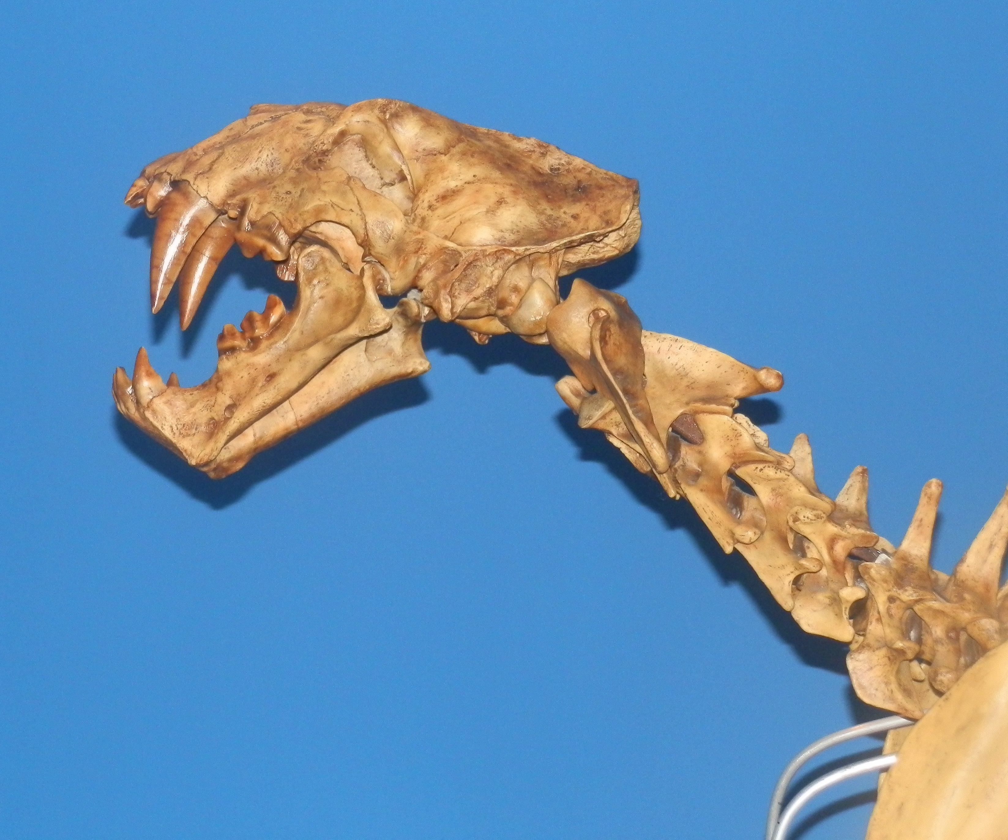 Réplica de esqueleto de Homotherium venezuelensis en PDVSA La Estancia, Maracaibo.